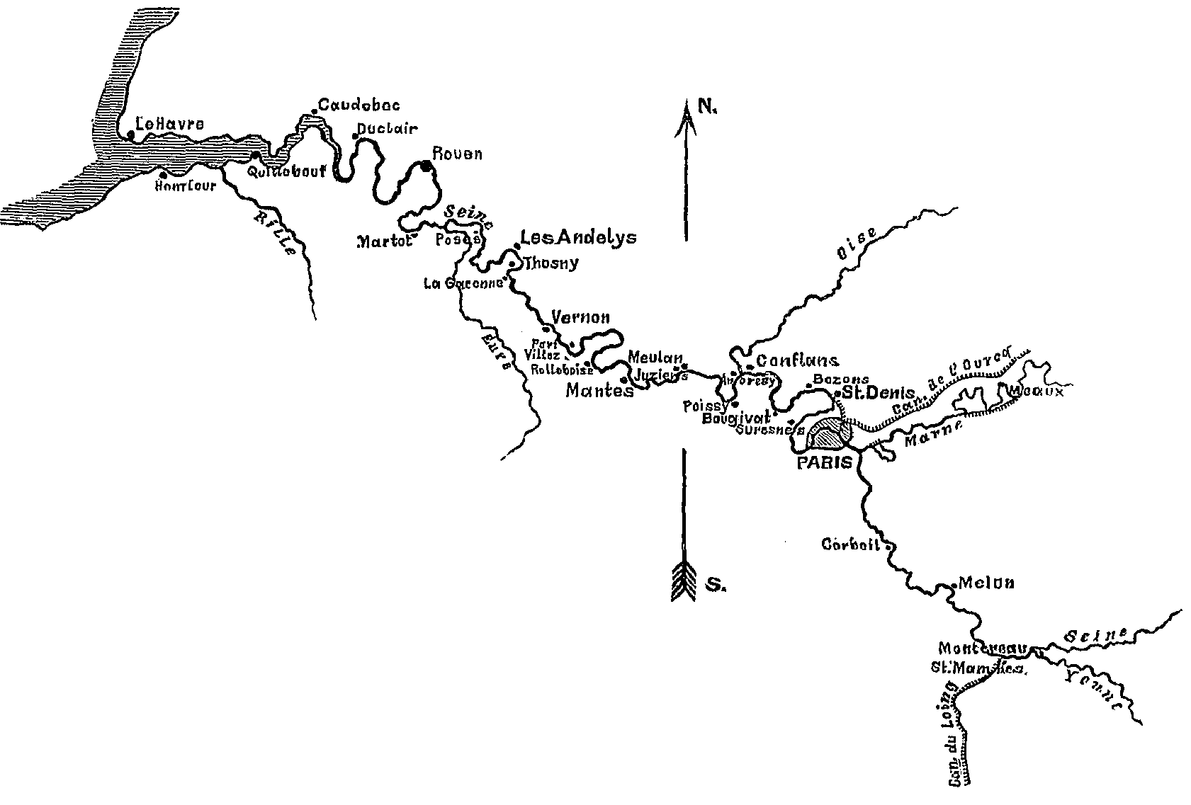 Deutsche Bauzeitung 1881 Heft 88-96 Seite 496